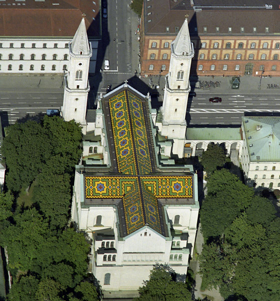 Luftbild vom neuen Mosaikdach der Münchner Ludwigskirche.